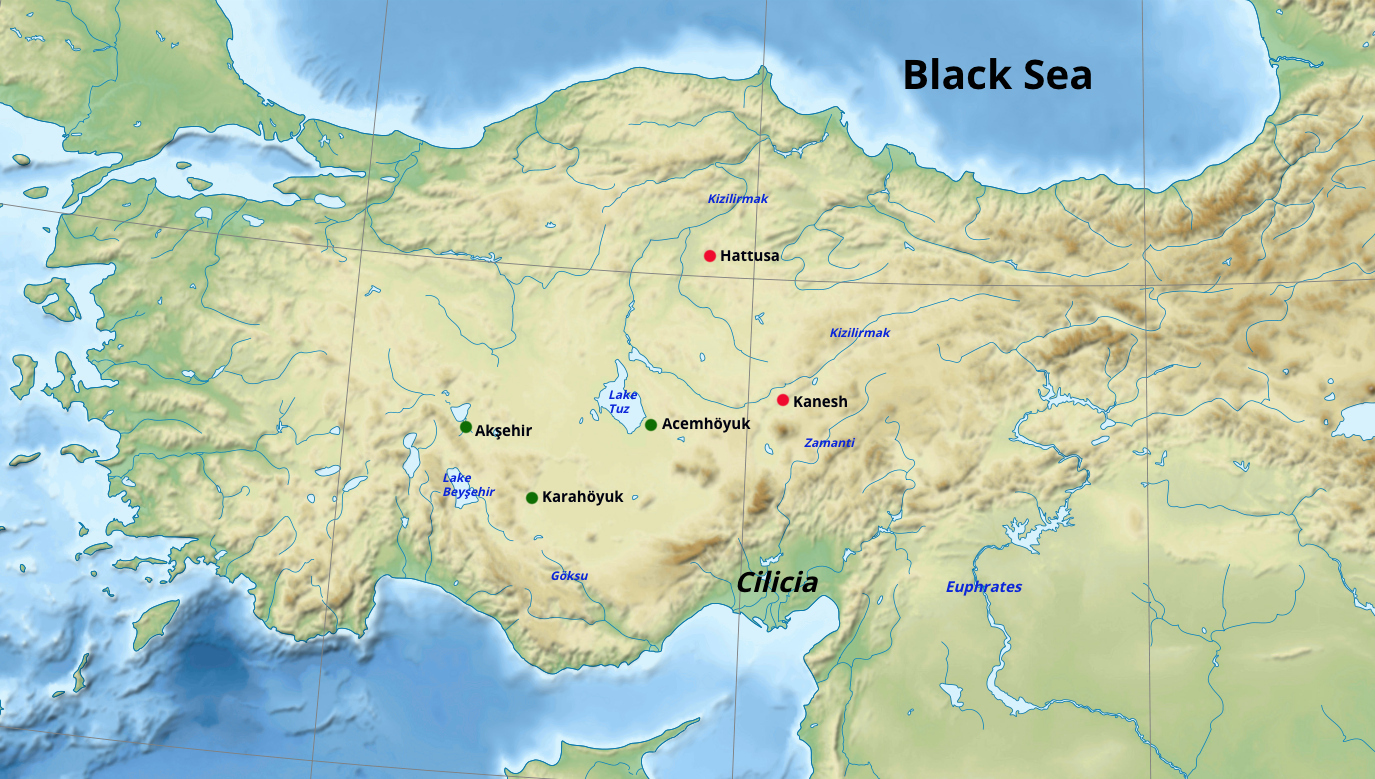 The proposed locations of Purushanda